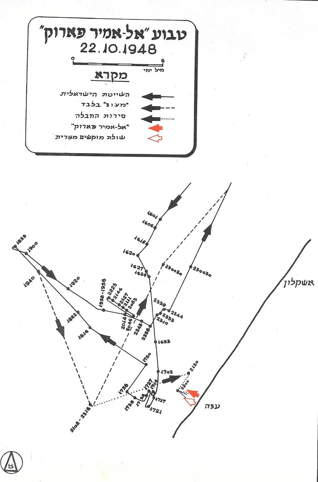 תנועת השייטת הגדולה לפני הקרב עם האמיר פארוק. 22 אוקטובר 1948.